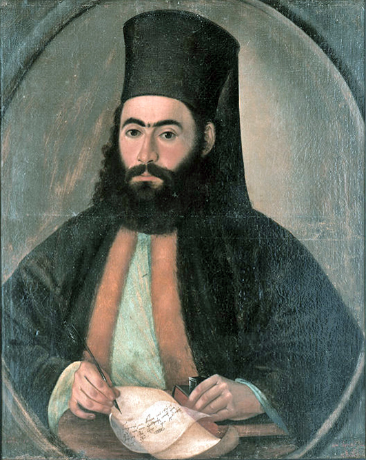 Αρχιεπίσκοπος Κύπρου Κυπριανός